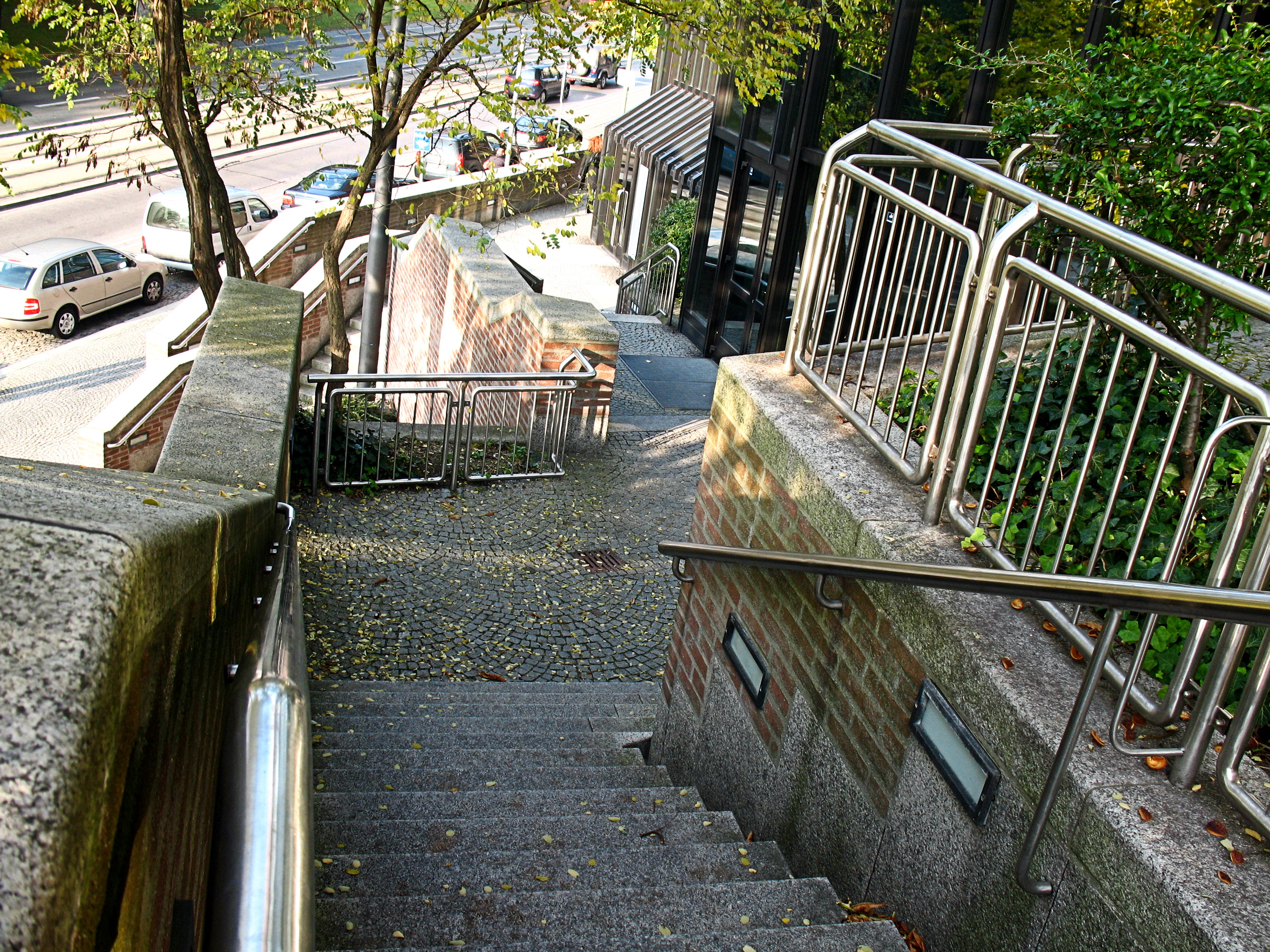 Der "gache Steig" zum Gasteig